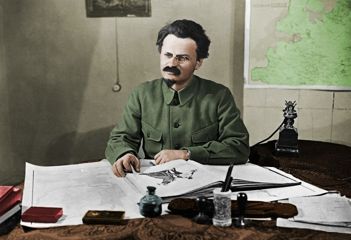 раскрашенная фотография